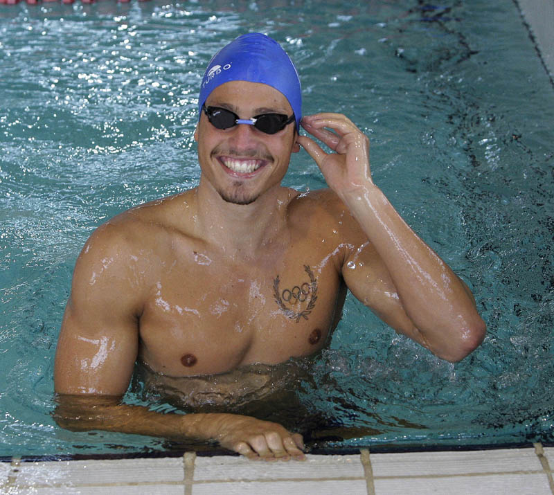 Fotografía de Aschwin Wildeboer